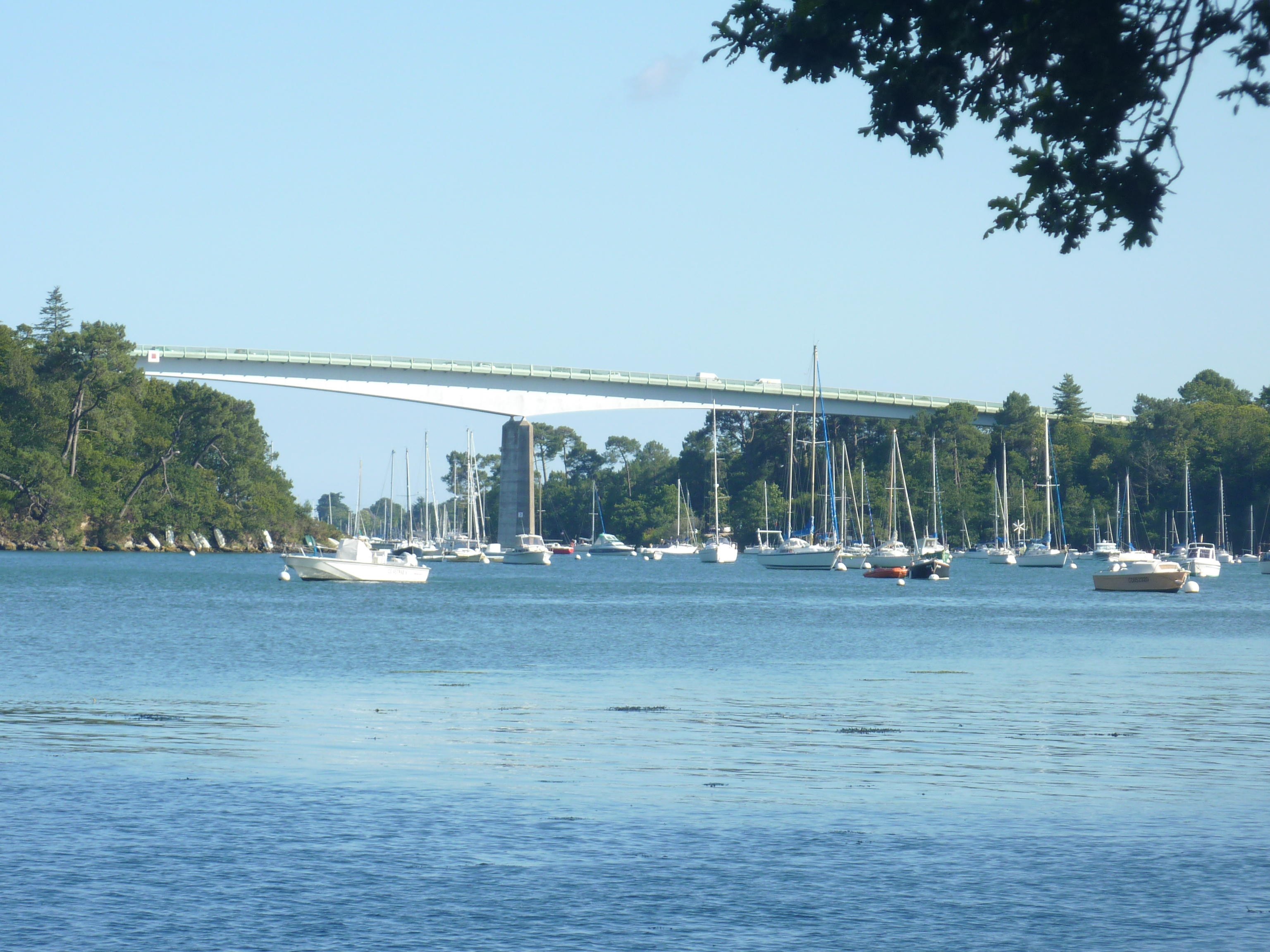 Le pont de Cornouaille (entre Bénodet et Combrit-Sainte-Marine, mais situé pour sa rive gauche sur le territoire de Clohars-Fouesnant) sur l'Odet vu de Pors Gwen en Gouesnac'h